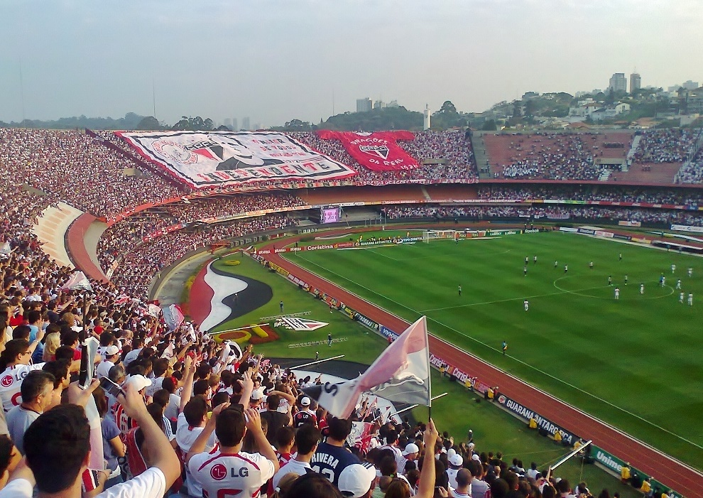 Estádio Cícero Pompeu de Toledo, ou Estádio do Morumbi